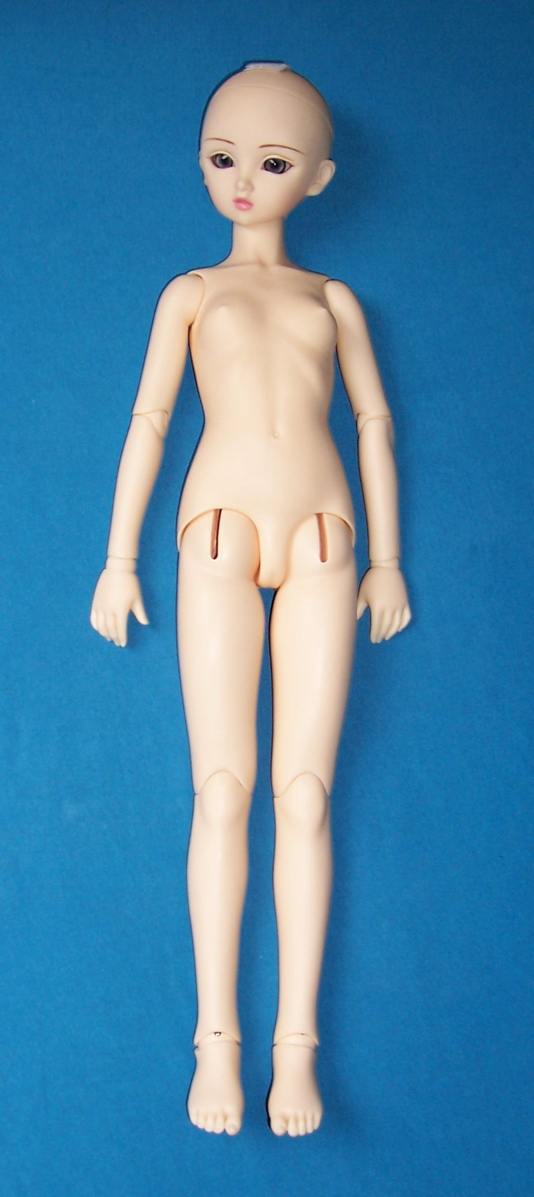 Super Dollfie Sara Pureskin